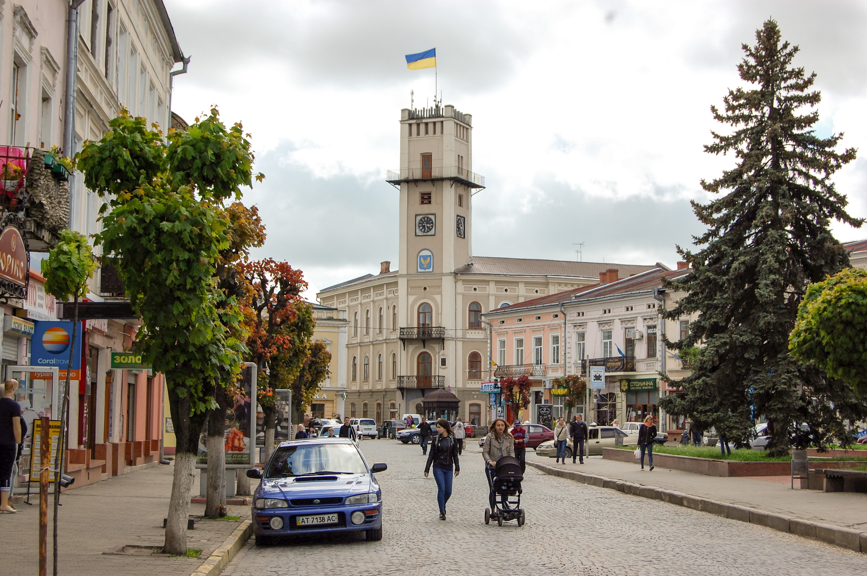 Ратуша (мур.), Коломия, вул. Стара дорога, 1